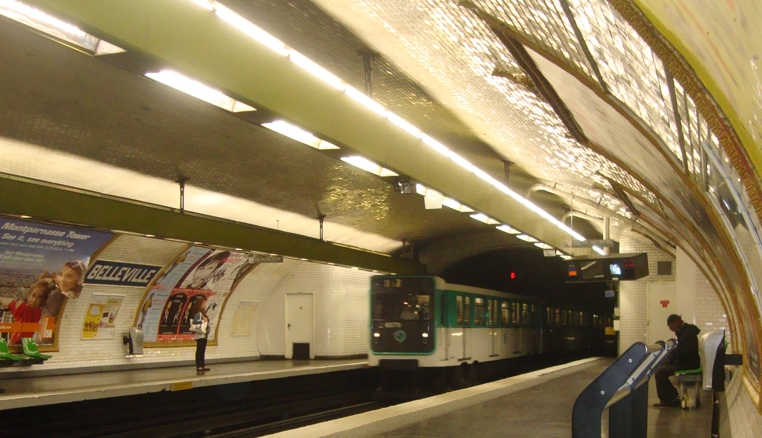 Quais de la station Belleville sur la ligne 11 du métro parisien avec rame entrant en station